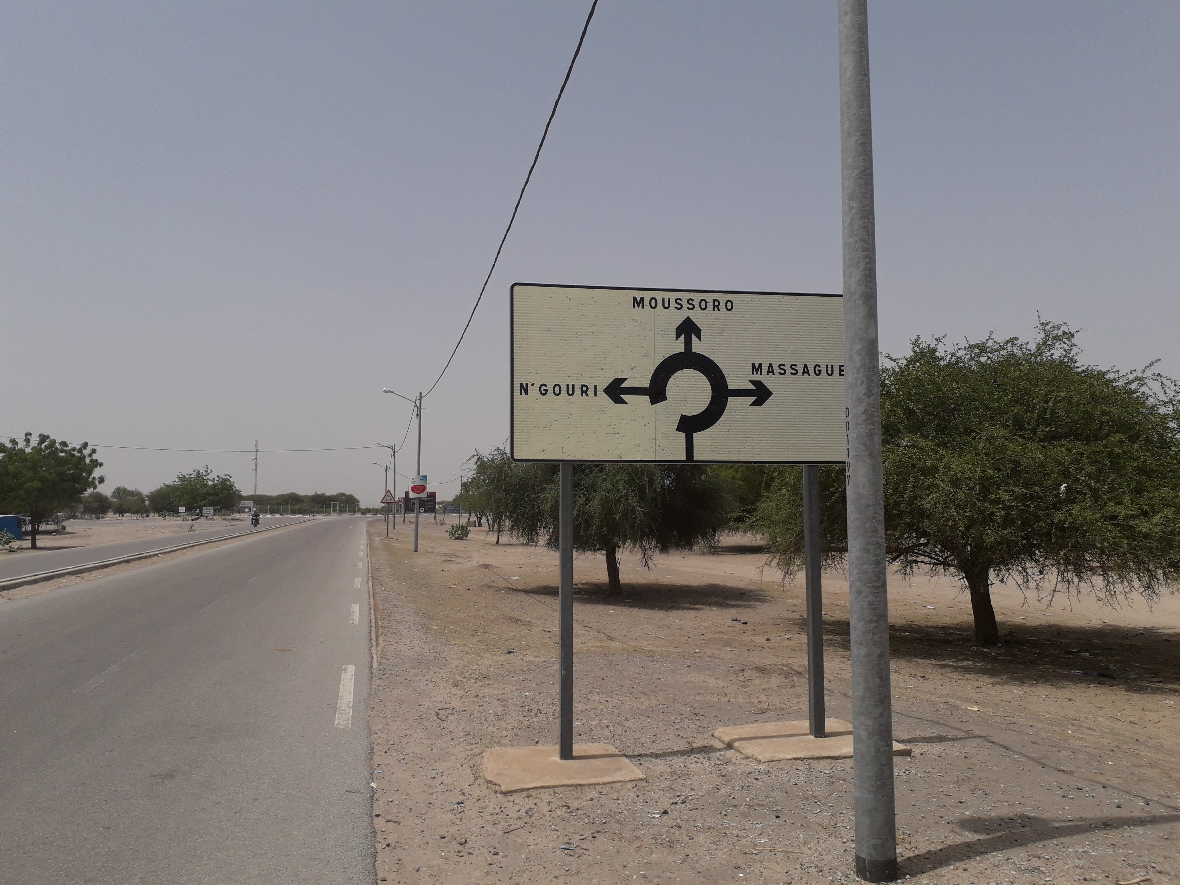 دوار مروري في المدخل الشمالي لمدينة ماساكوري